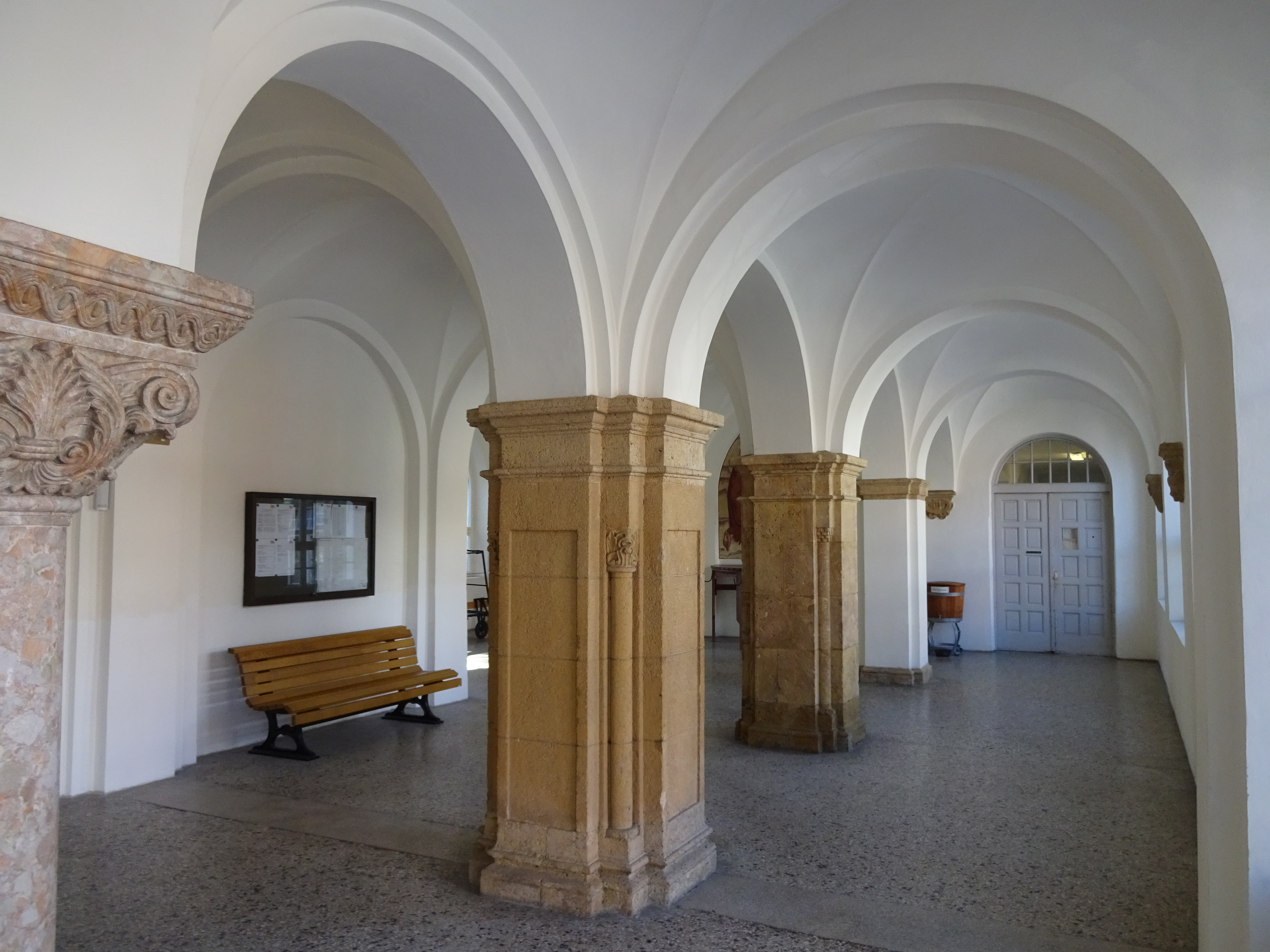 Ostfriedhof (Pradler Friedhof), Innsbruck: Pfeilervorhalle This media shows the remarkable cultural object in the Austrian state of Tyrol listed by the Tyrolean Art Cadastre with the ID 72806. (on tirisMaps, pdf, more images on Commons, Wikidata)